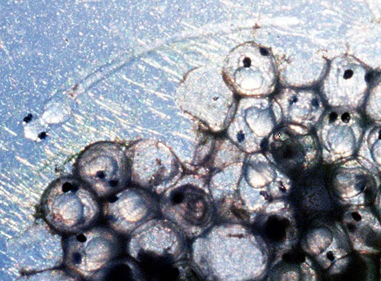 청어의 알